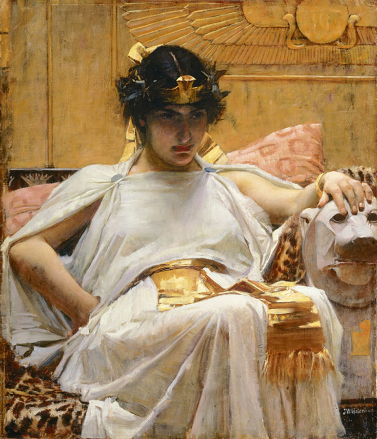 Cleopatra